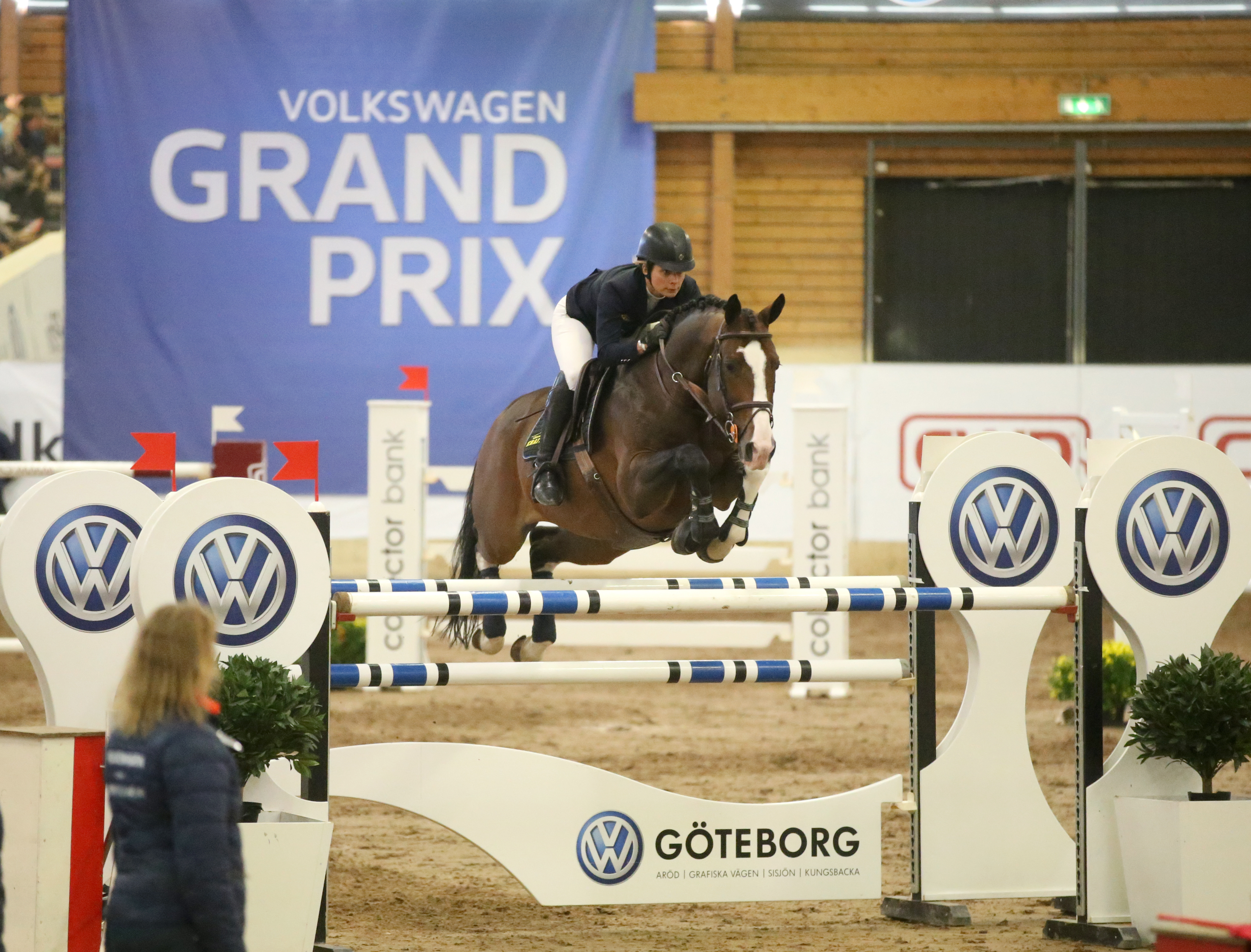 Linda Heed och Niveau deltar i VW Grand Prix 2015 på Billdals Ridklubb.